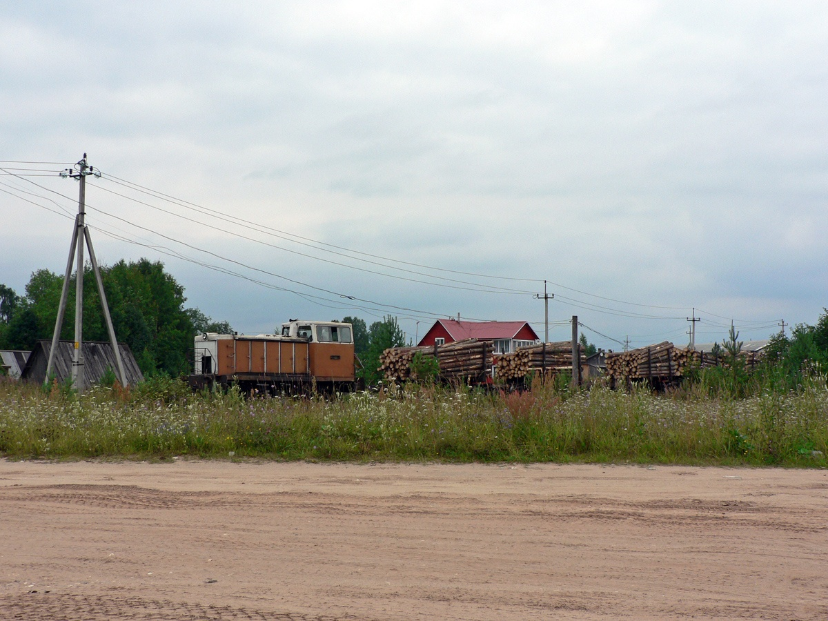 ТУ8-0017 везет груз на нижний склад